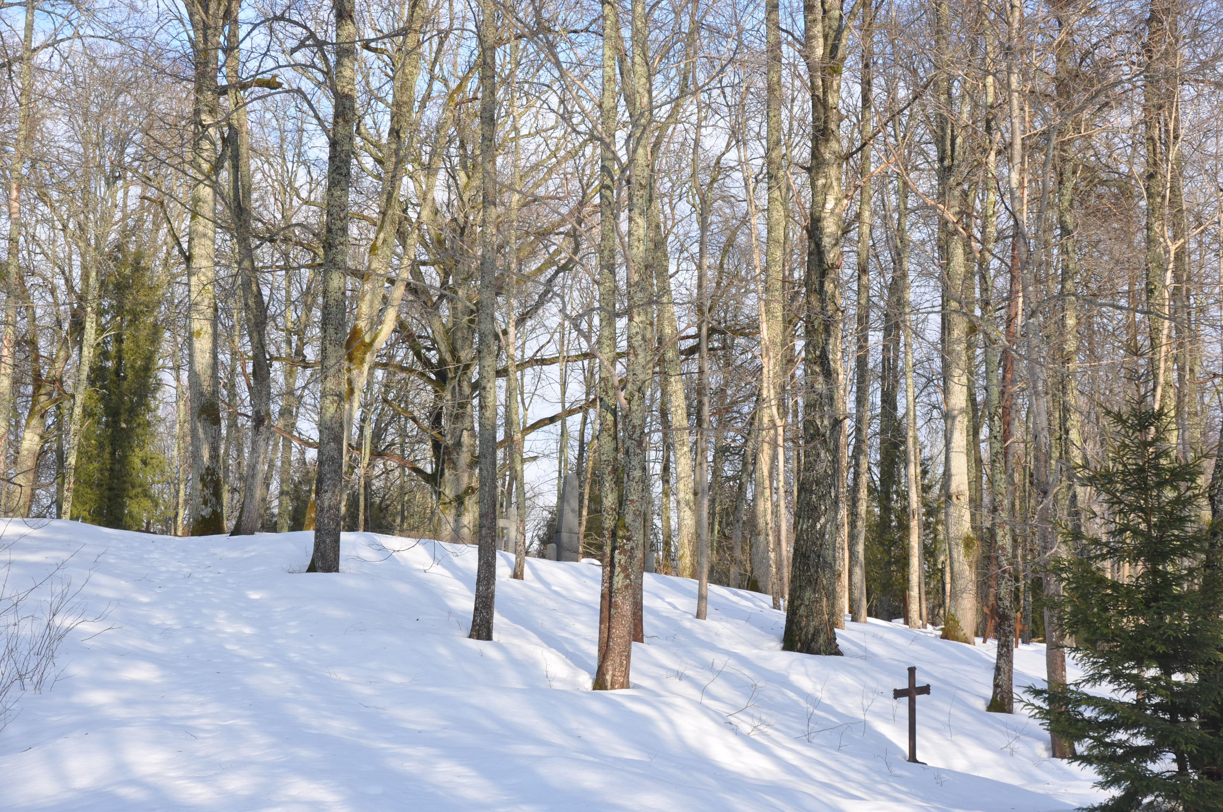 Vecogres (Baltavas) kapi, Mazozolu pagasts, Ogres novads, Latvia